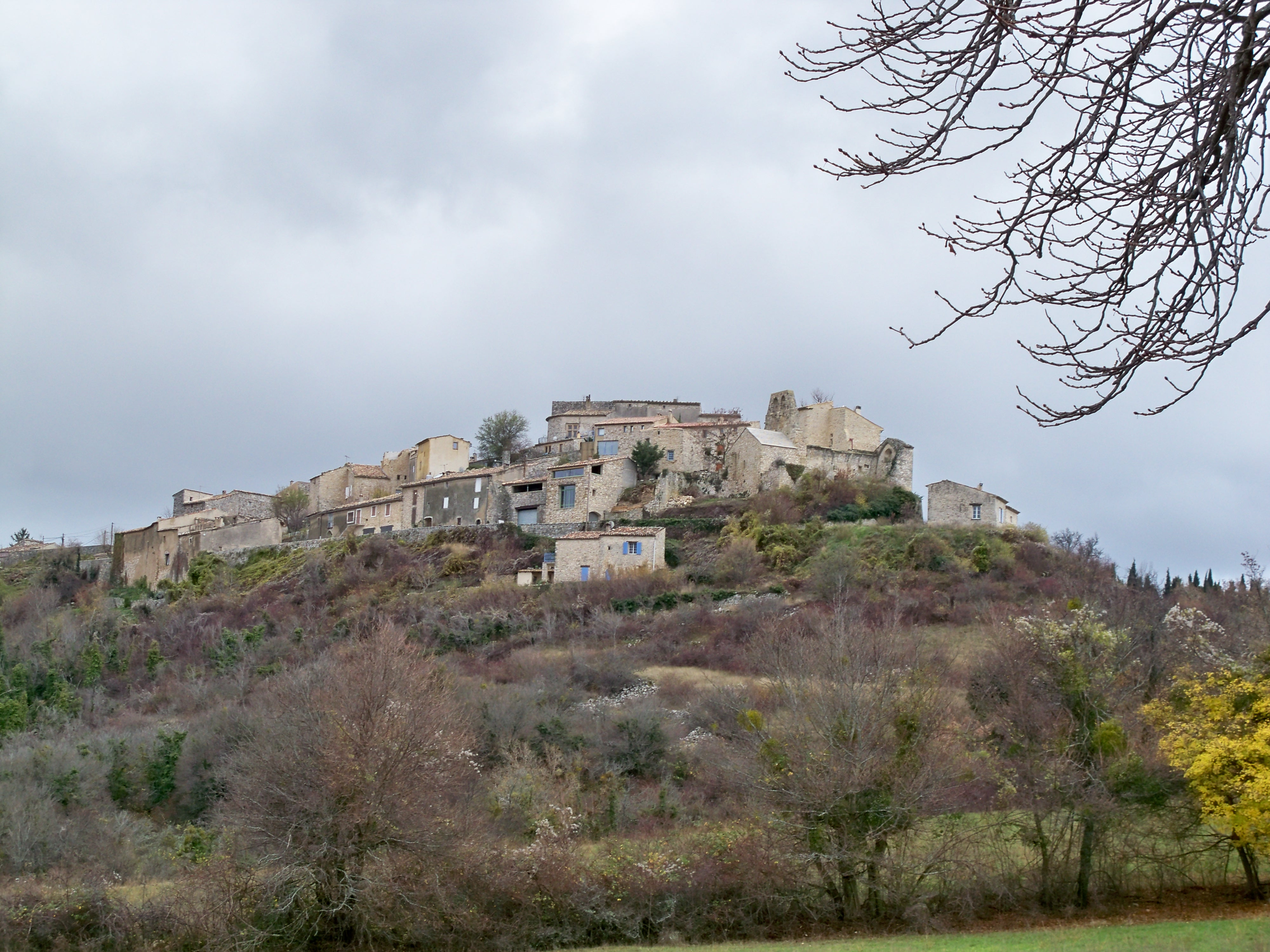 vue sur le village de Vachères (04)